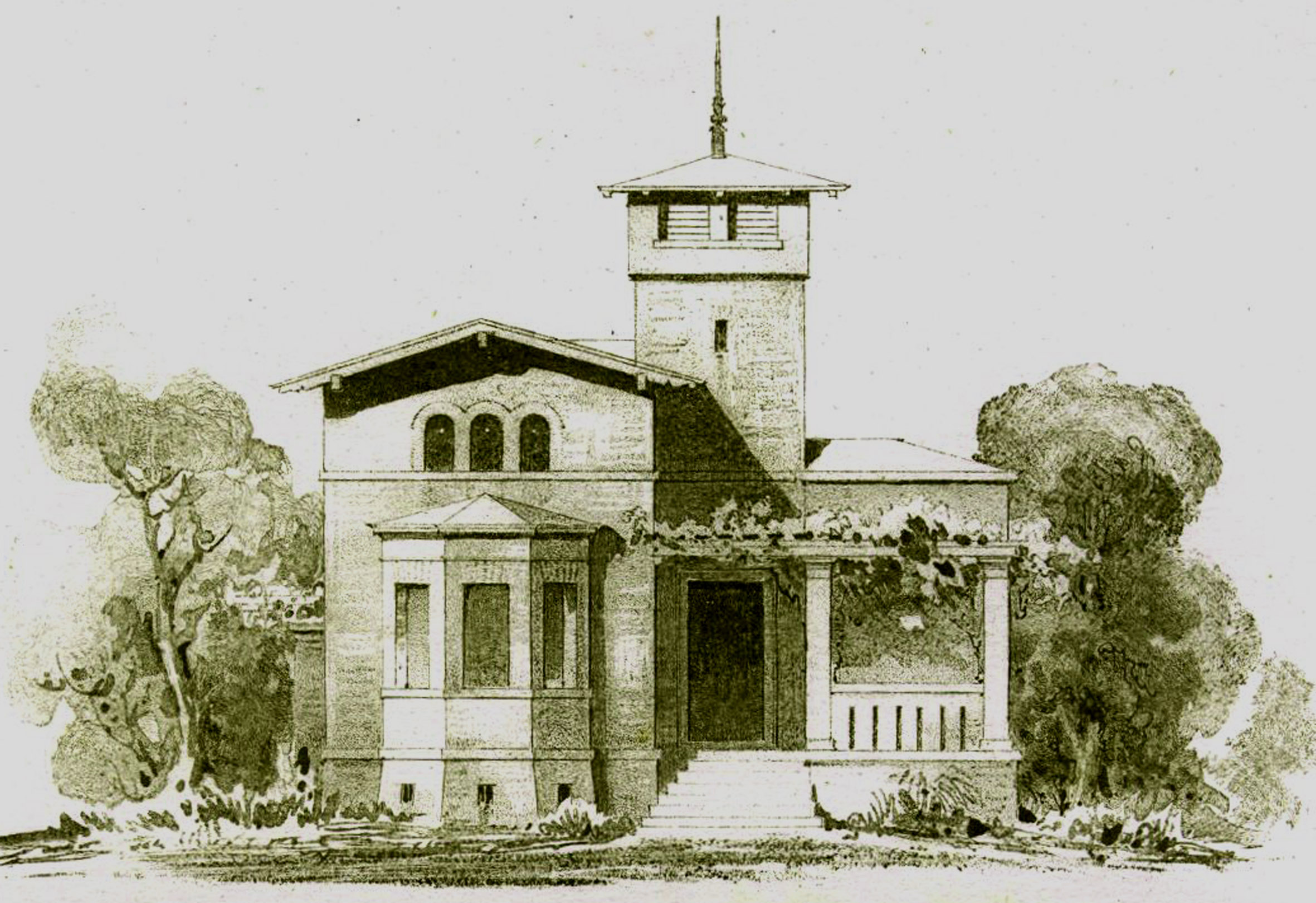 Wildparktor, Veröffentlichung v. Arnims